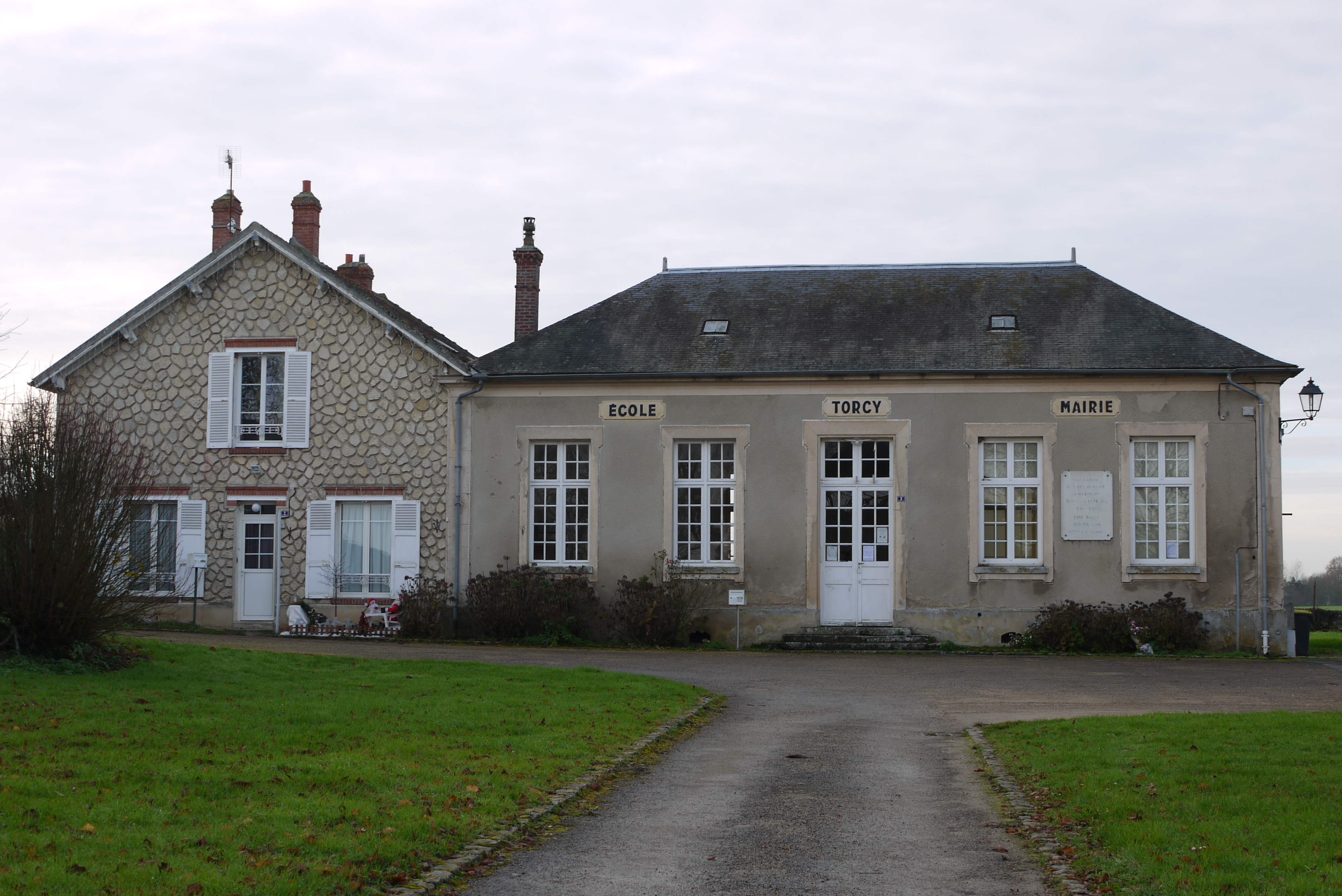 L'école-mairie de Torcy-en-Valois.